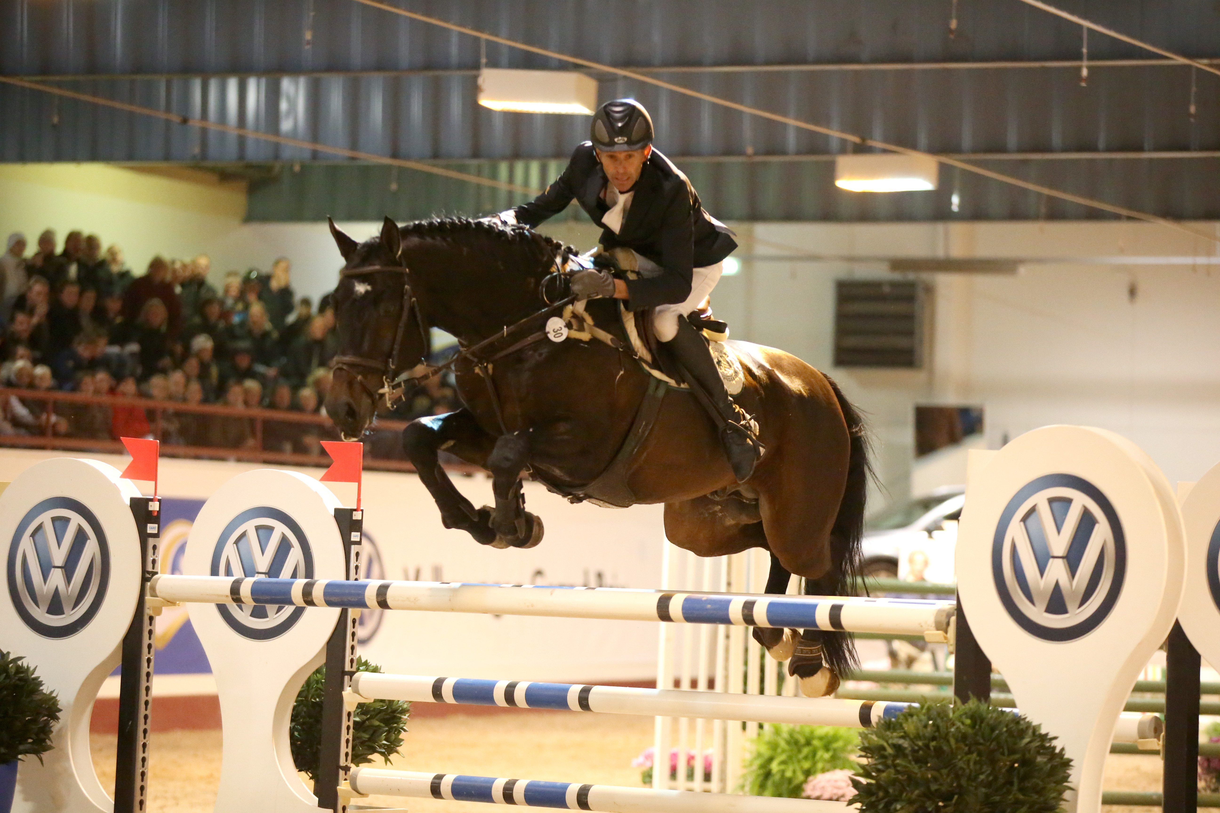 Niklas Arvidsson och Click and Cash 1155 vann Volkswagen Grand Prix i Södertälje 2013.